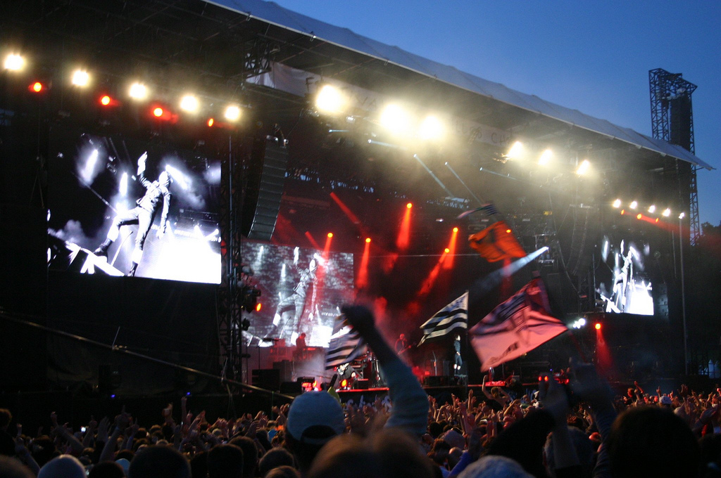 Indochine au Festival des Vieilles Charrues 2010 à Carhaix